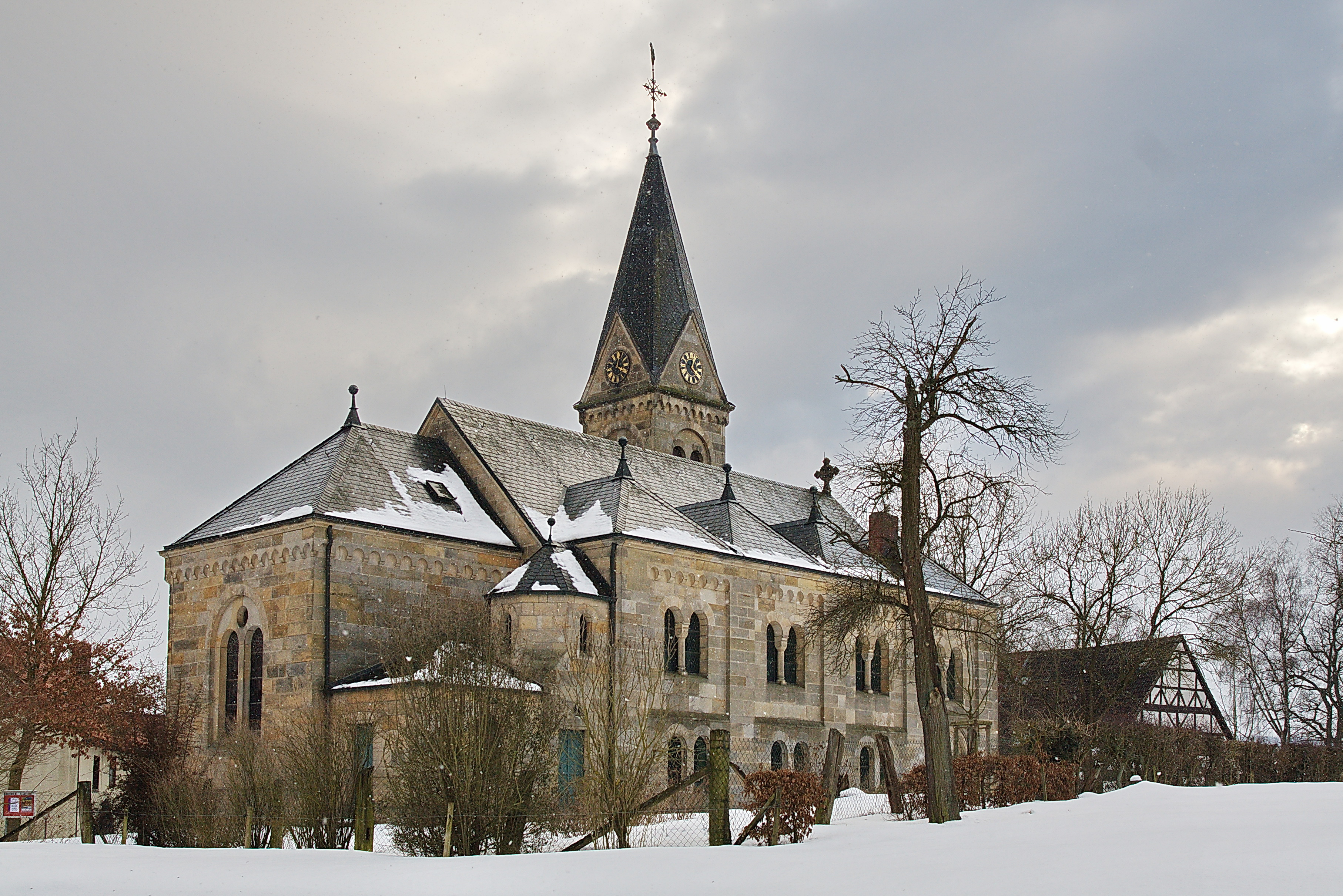 St.-Petri-Kirche in Flegessen (Bad Münder), Niedersachsen, Deutschland